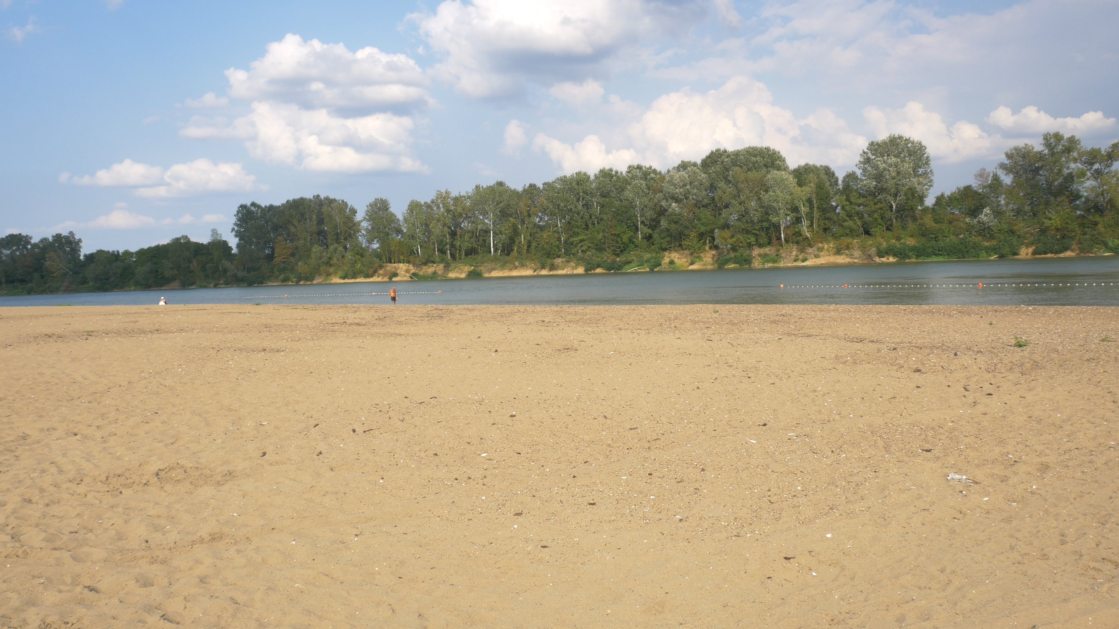 Gradsko kupalište "Poloj" u Slavonskom Brodu